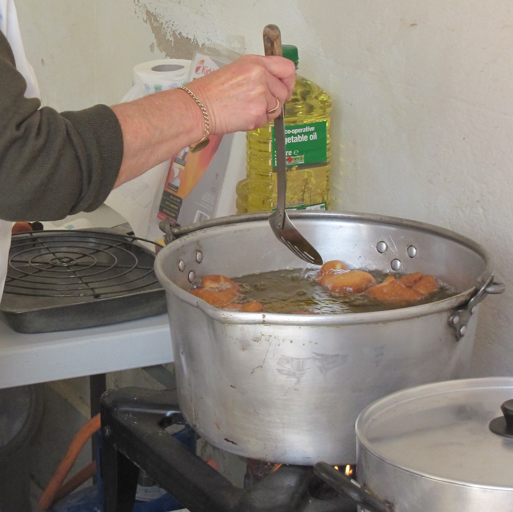 Nrf: Des mèrvelles à la Faîs'sie d'Cidre, 17-18 d'Octobre 2009, Jèrri